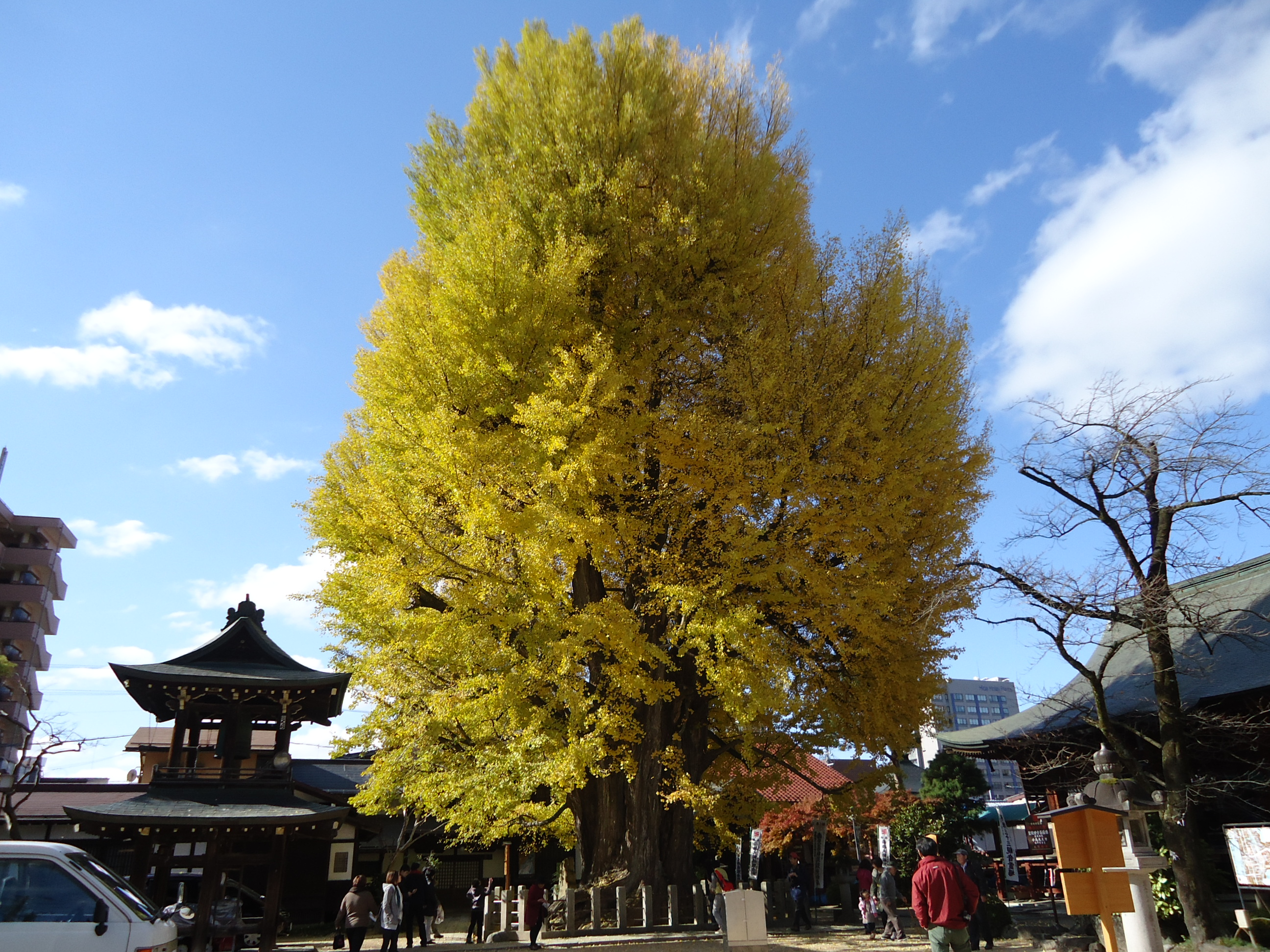 飛騨国分寺の大銀杏の様子(2013年11月撮影)